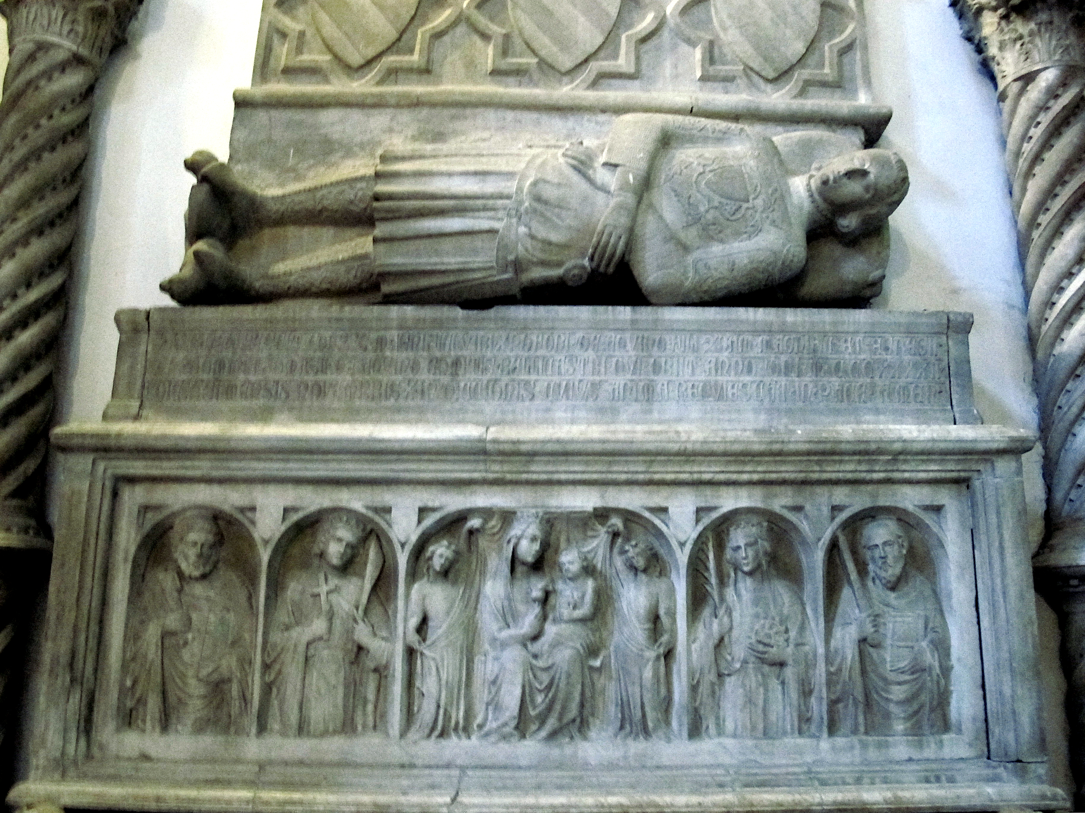 San Domenico Maggiore, Napoli